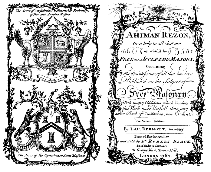 L’Ahiman Rezon (qui signifie en hébreu "une aide à un frère") est un ouvrage majeur de la franc-maçonnerie écrit par Laurence Dermott en 1751 et publié pour la première fois en 1756. Il connaîtra de nombreuses éditions (huit en tout) jusqu'en 1813.